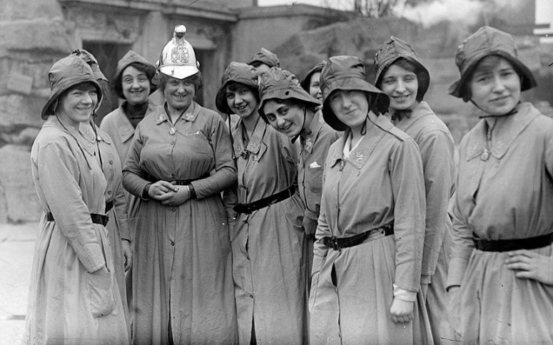 suhiltzaile emakumeak